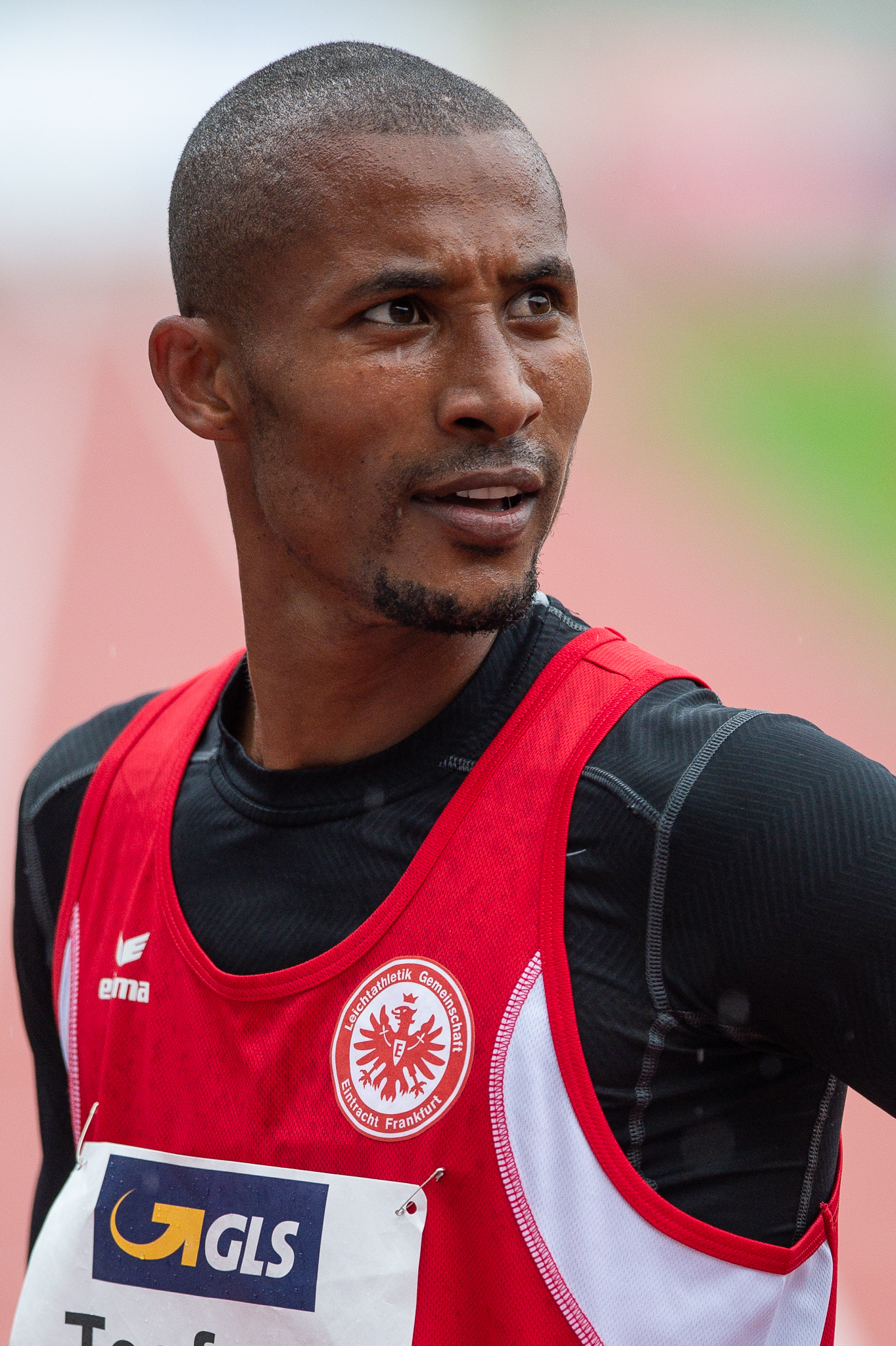 1500-Meter-Lauf,DLV,Deutsche Leichtathletik Meisterschaften 2018,Deutscher Leichtathletik-Verband,Homiyu Tesfaye,LG Eintracht Frankfurt,Max-Morlock-Stadion